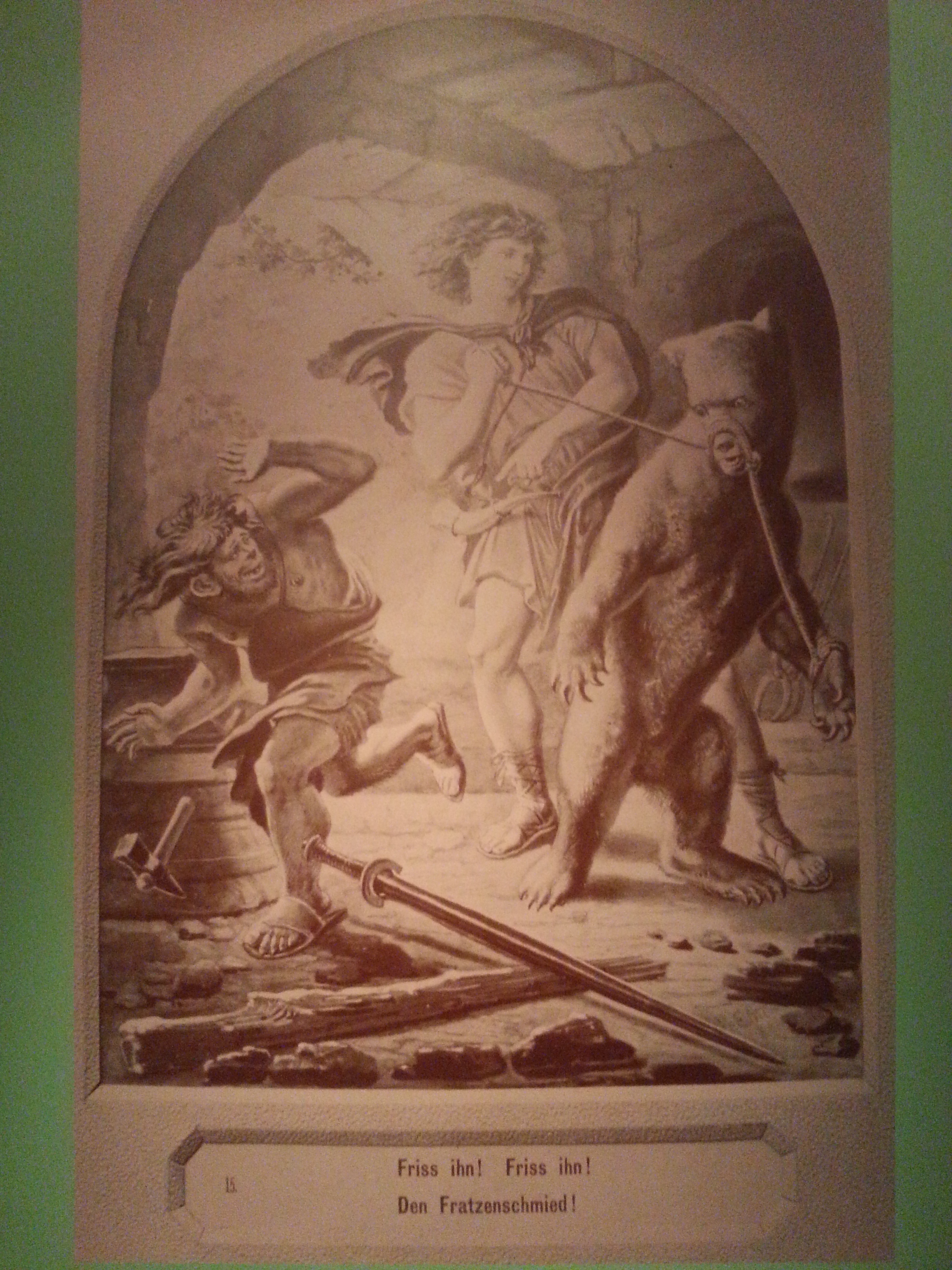 Nibelungengang in der Münchner Residenz, Bayern. (1944 durch Bombenangriffe zerstört)